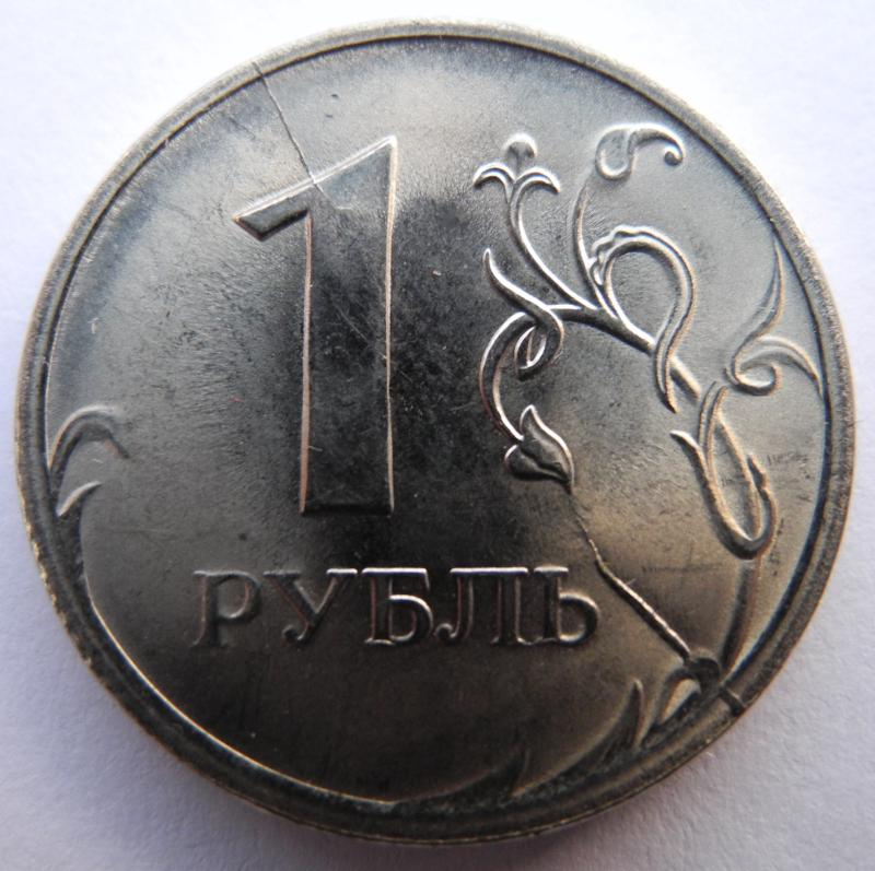 1 рубль банка России. Неполный раскол